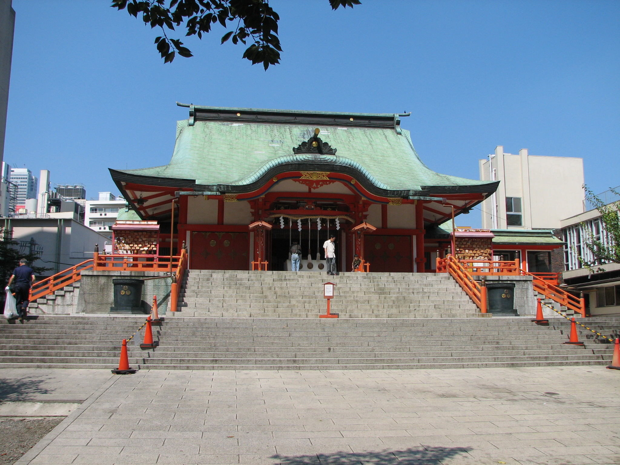 the haiden of Hanazono-jinja, Shinjuku, Tōkyō, Japan 花園神社拝殿（東京都新宿区）